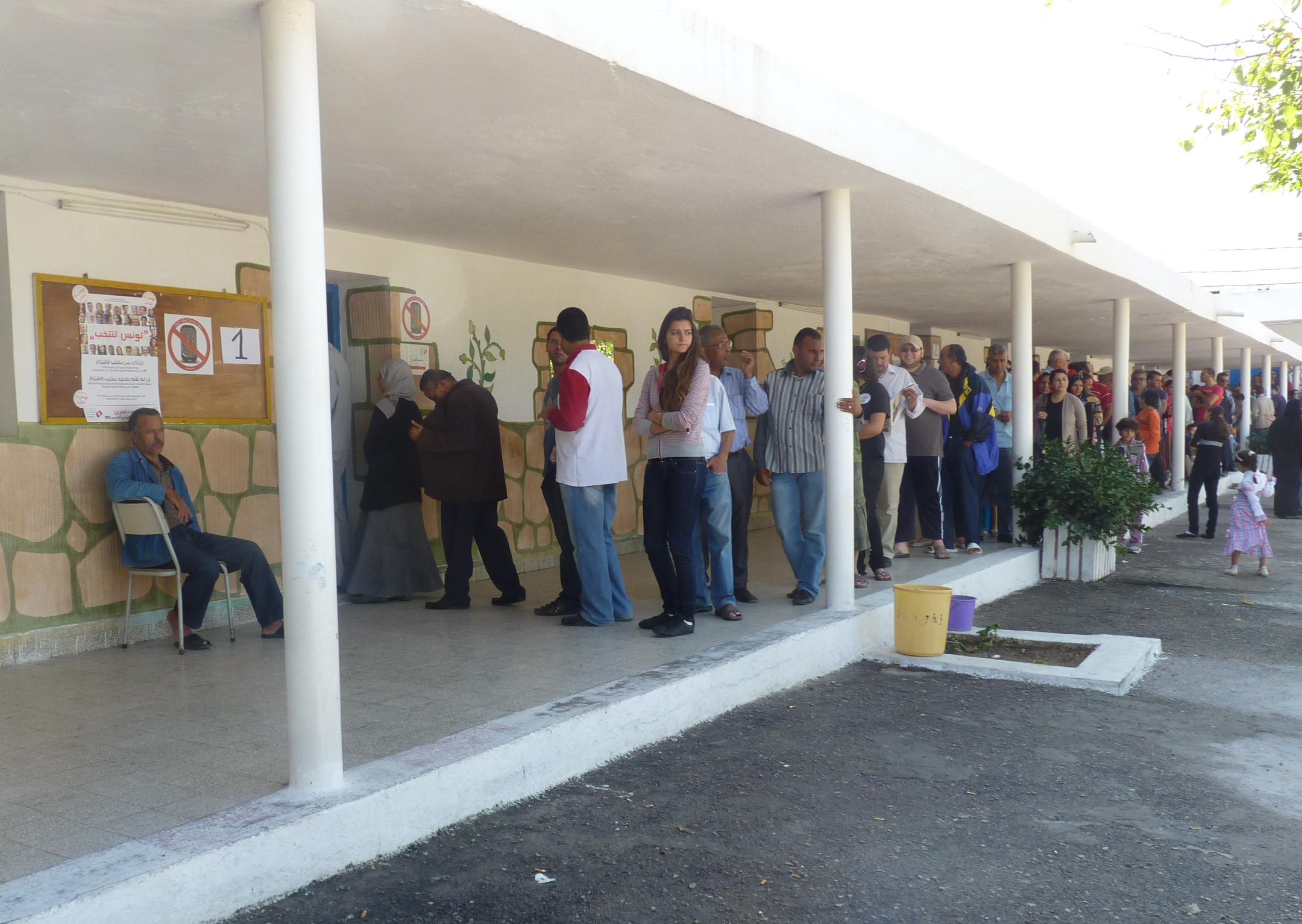 File d'attente devant un bureau de vote dans la région de Sousse à l'occasion de l'élection de l'assemblée constituante le 23 octobre 2011